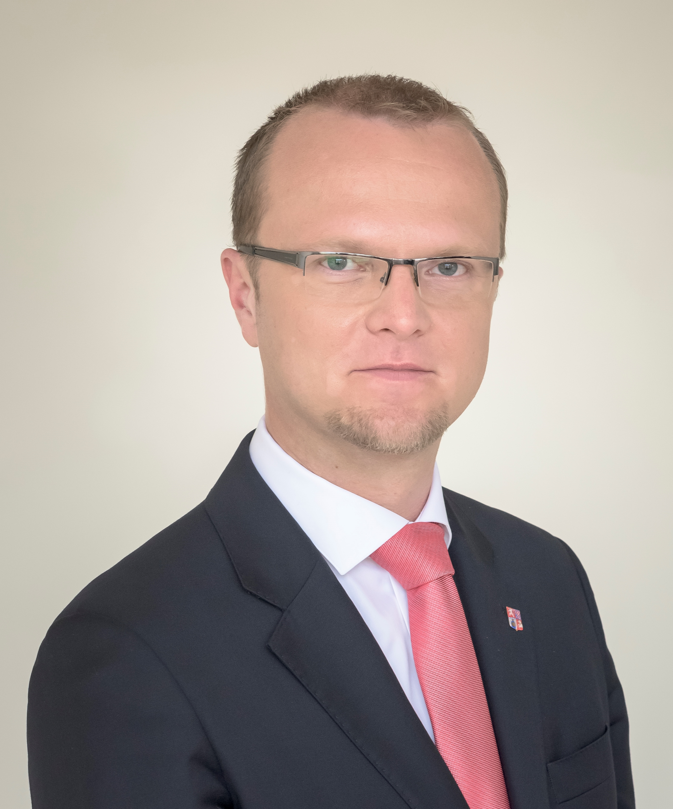 Hejtman Pardubického kraje Martin Netolický